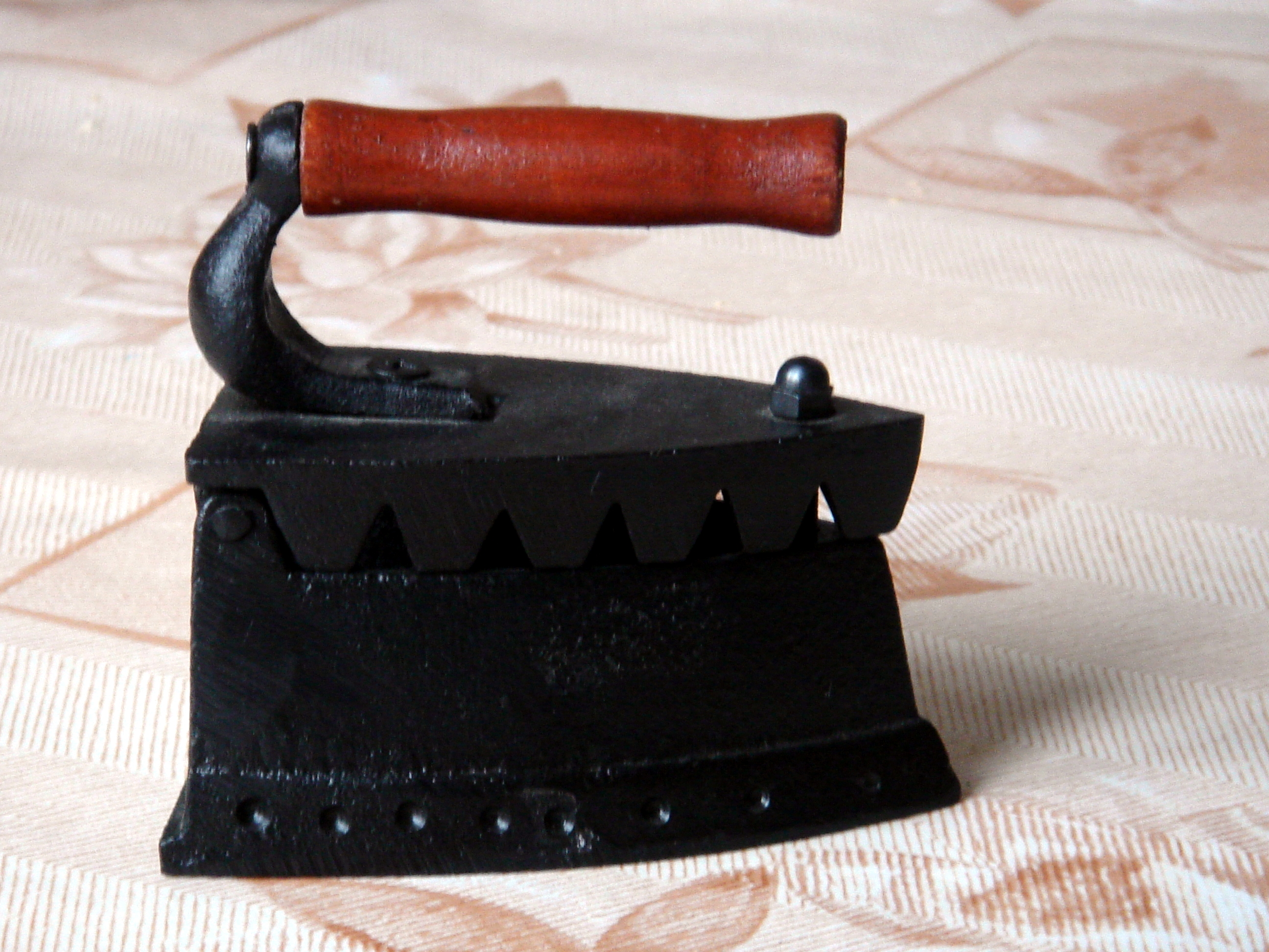 Plancha antigua de carbón.